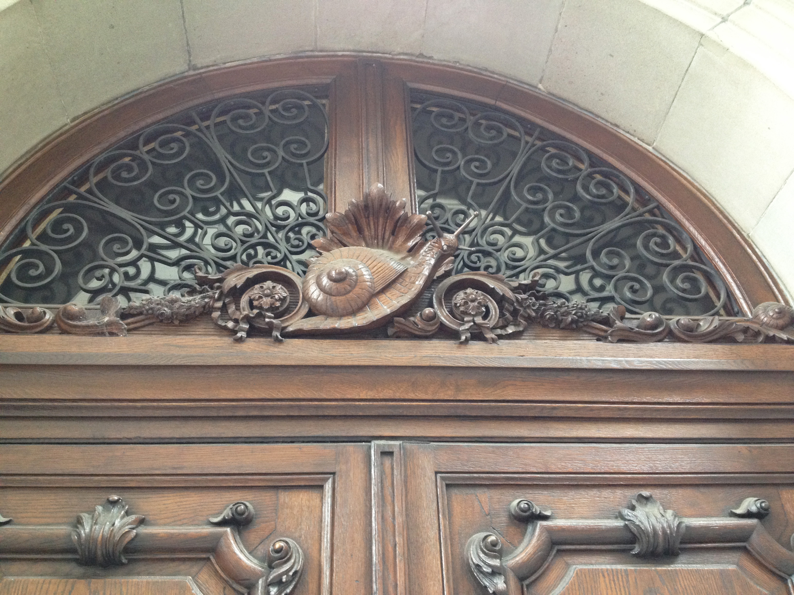 Hölzerne, geschnitzte Schnecke auf dem Türsturz des Hauses zum Schneggen in Zürich